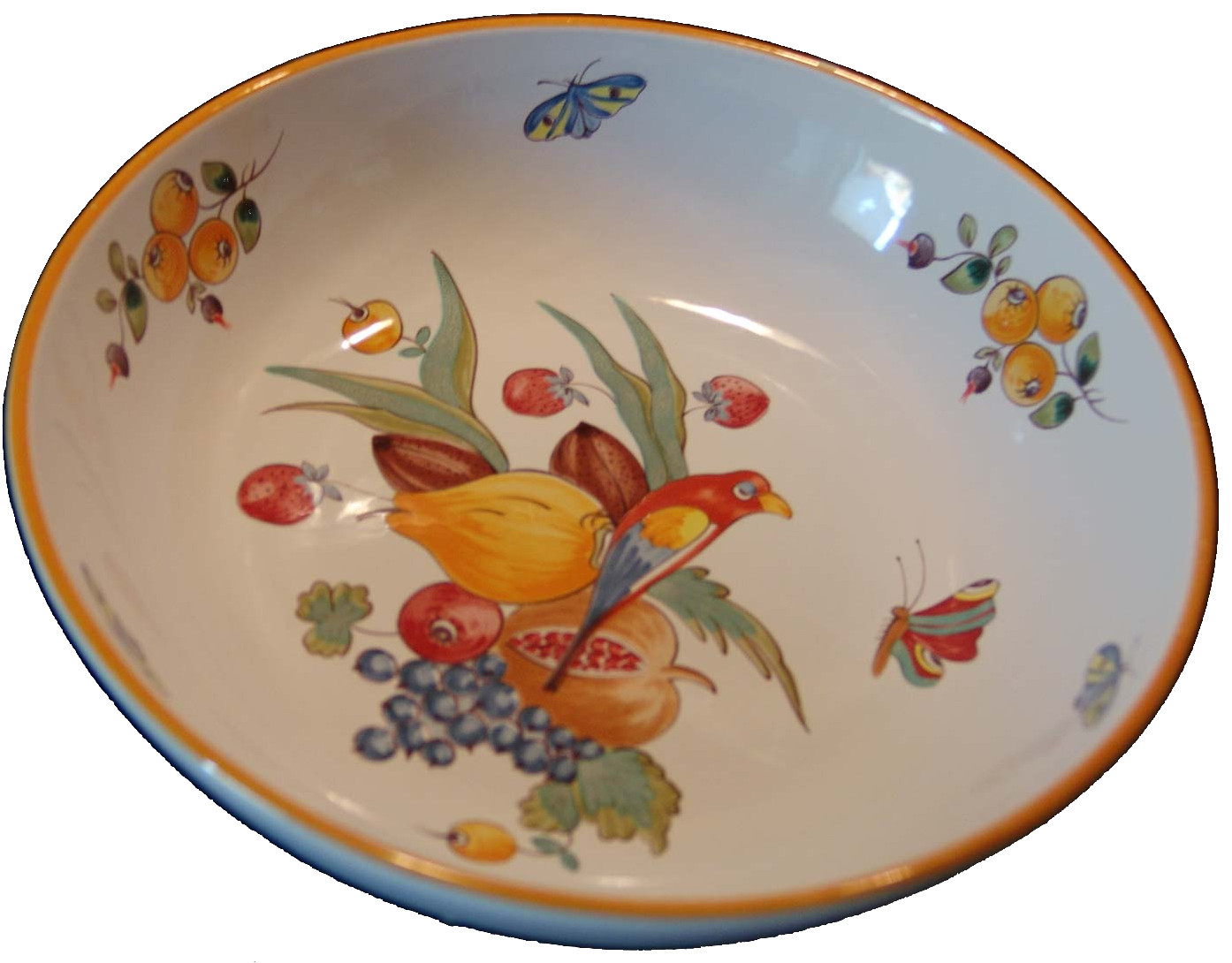 Plat en faïence de La Chapelle-des-Pots (17), décor "Exotique" d'inspiration 18ème siècle.